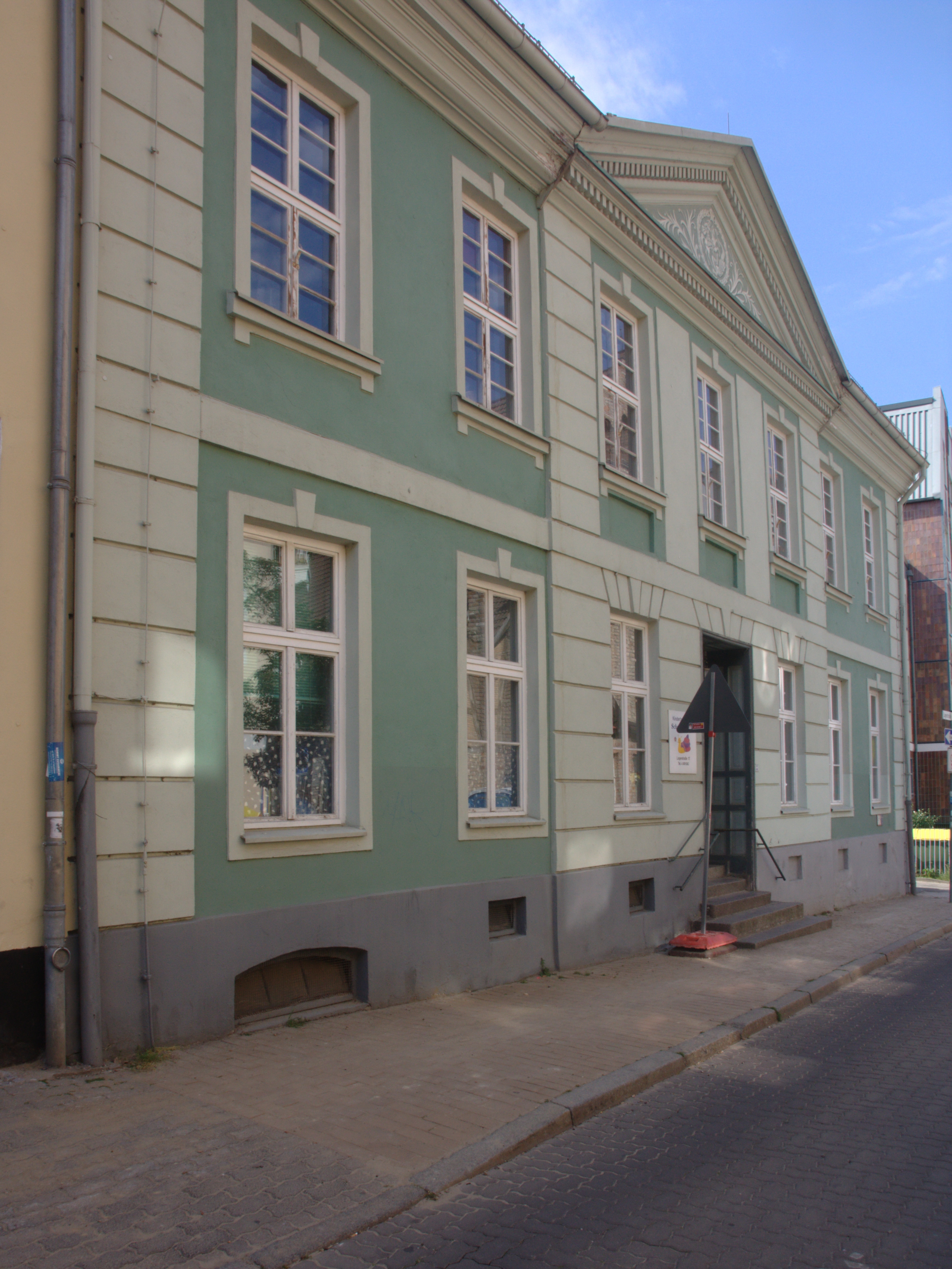 Lagerstraße 17, Rostock-Stadtmitte (Baudenkmal)